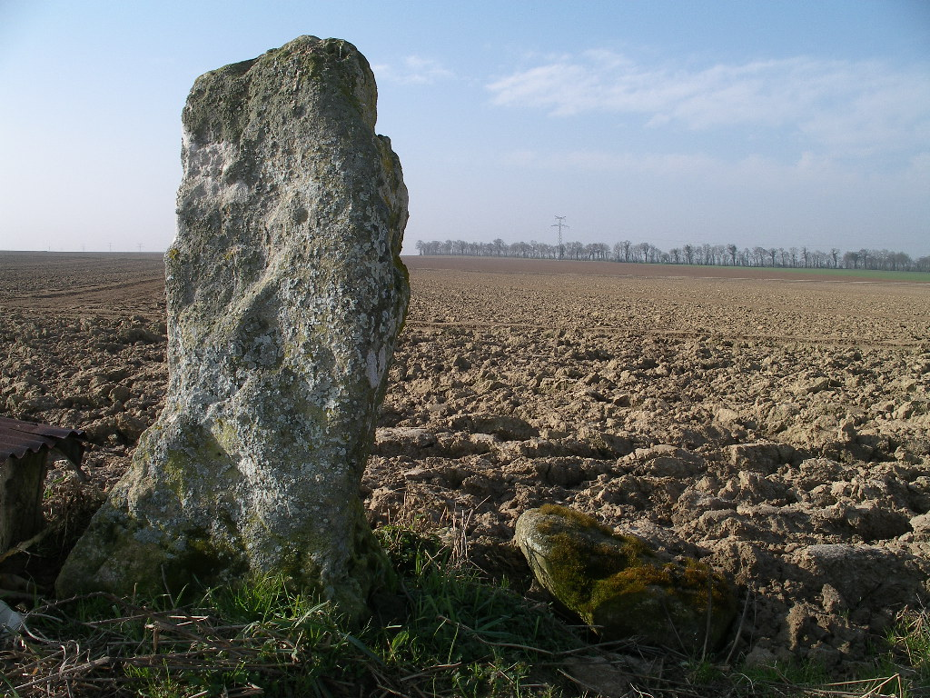 menhir de la Grosse Devise 1 à Thaon (Calvados)